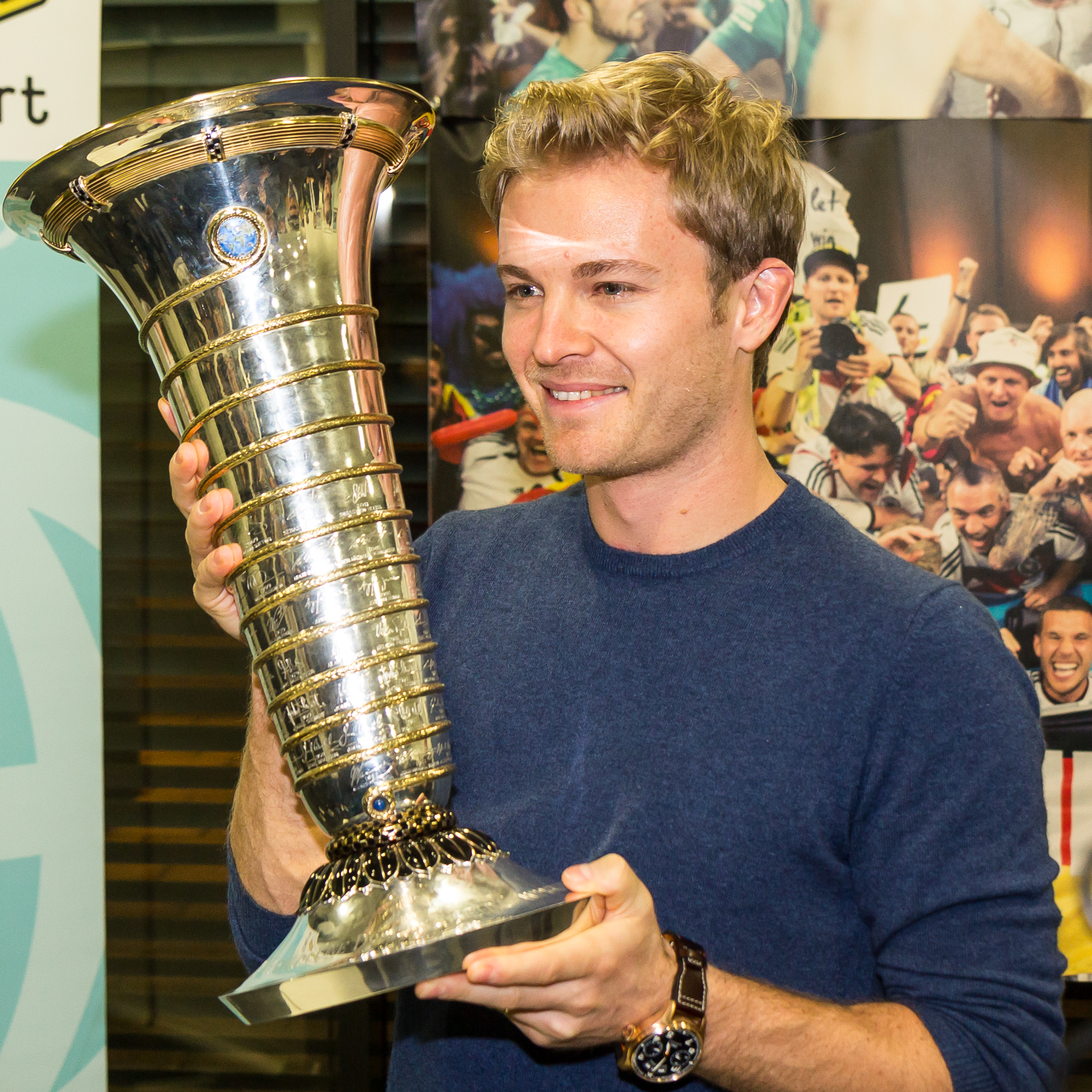 Pressetermin Lukas Podolski und Nico Rosberg, Airport Köln-Bonn